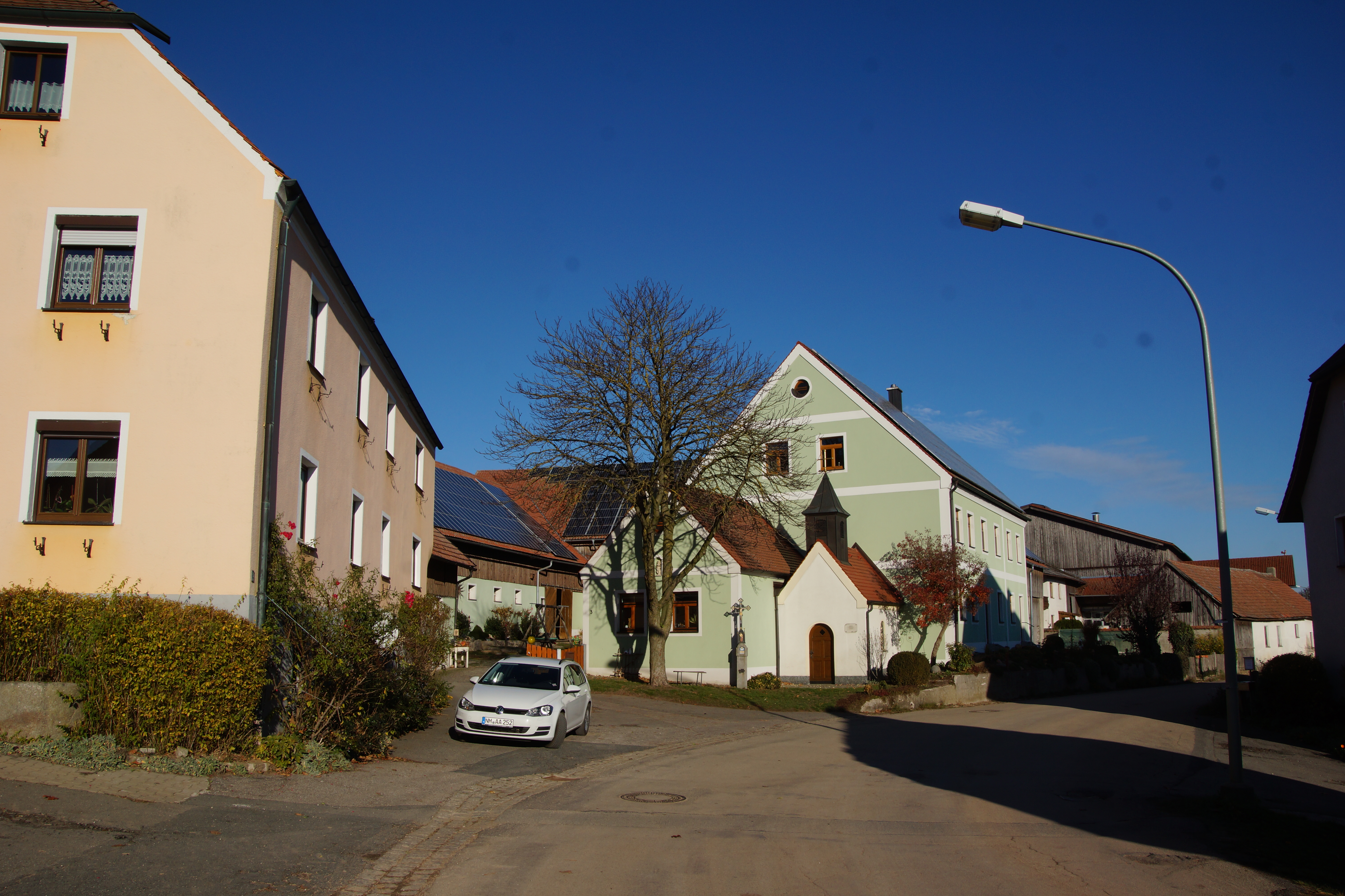 Mertenberg bei Schnaittenbach